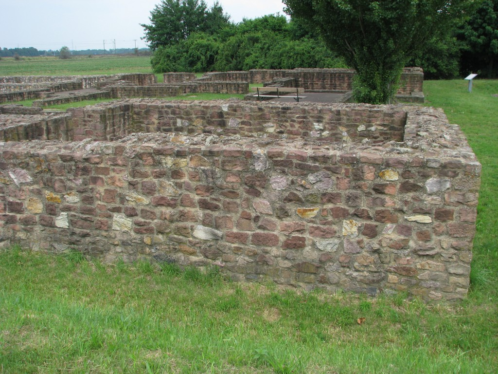 Villa rustica in Hirschberg-Großsachsen